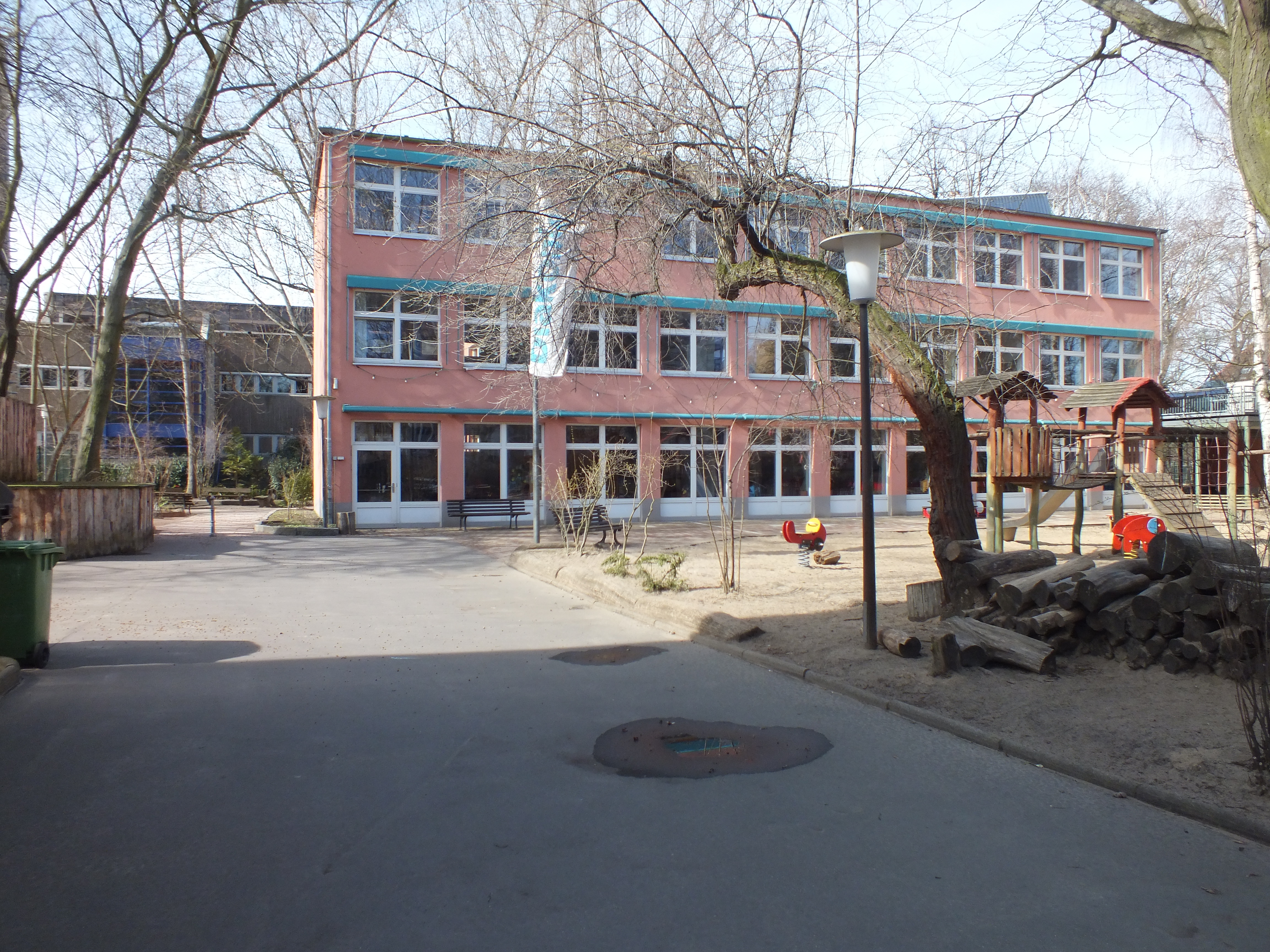 Fontanepromenade 14: Teil der Kinderkombination in Kreuzberg